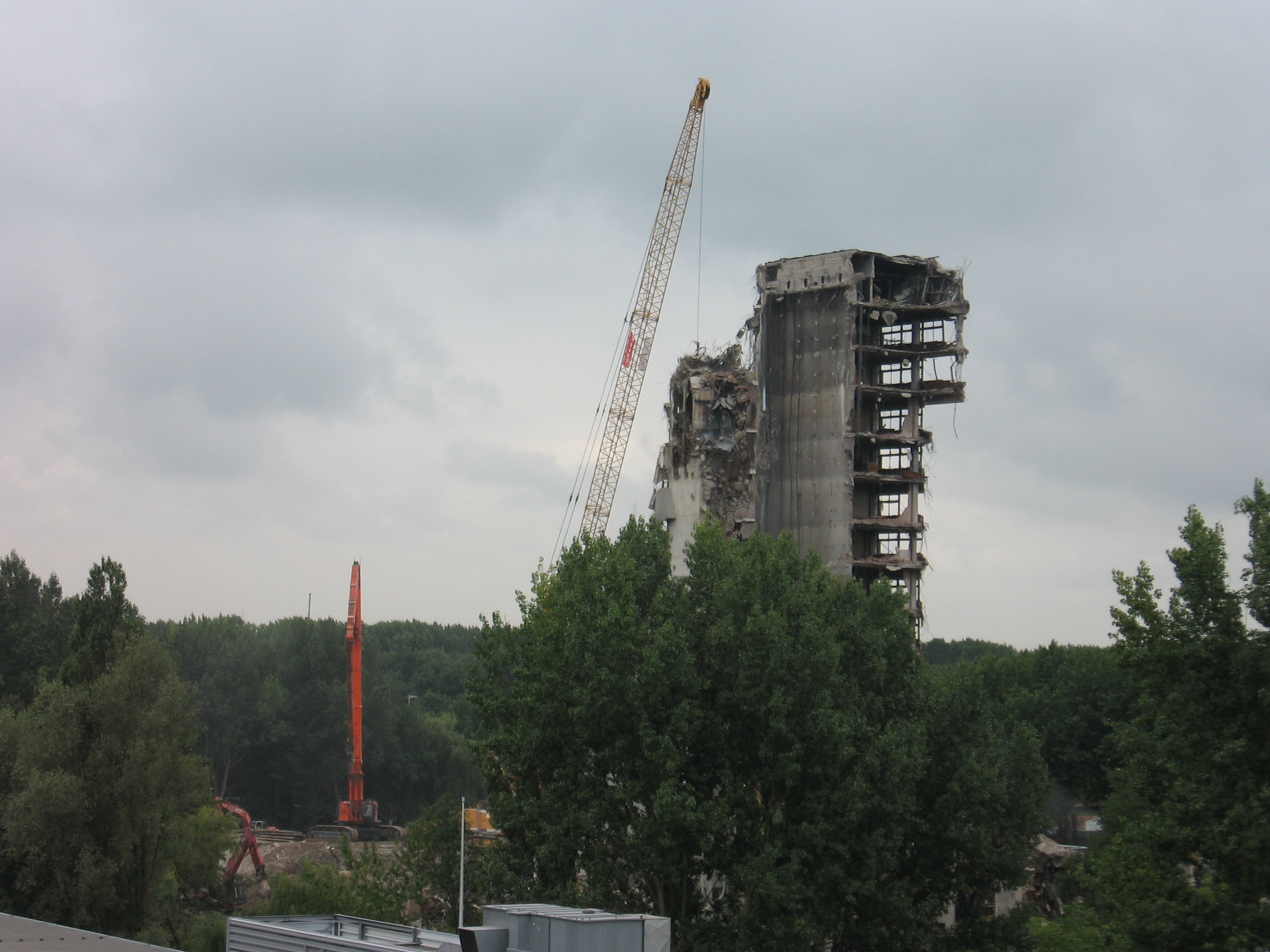 sloop bouwkunde 28 aug 2008